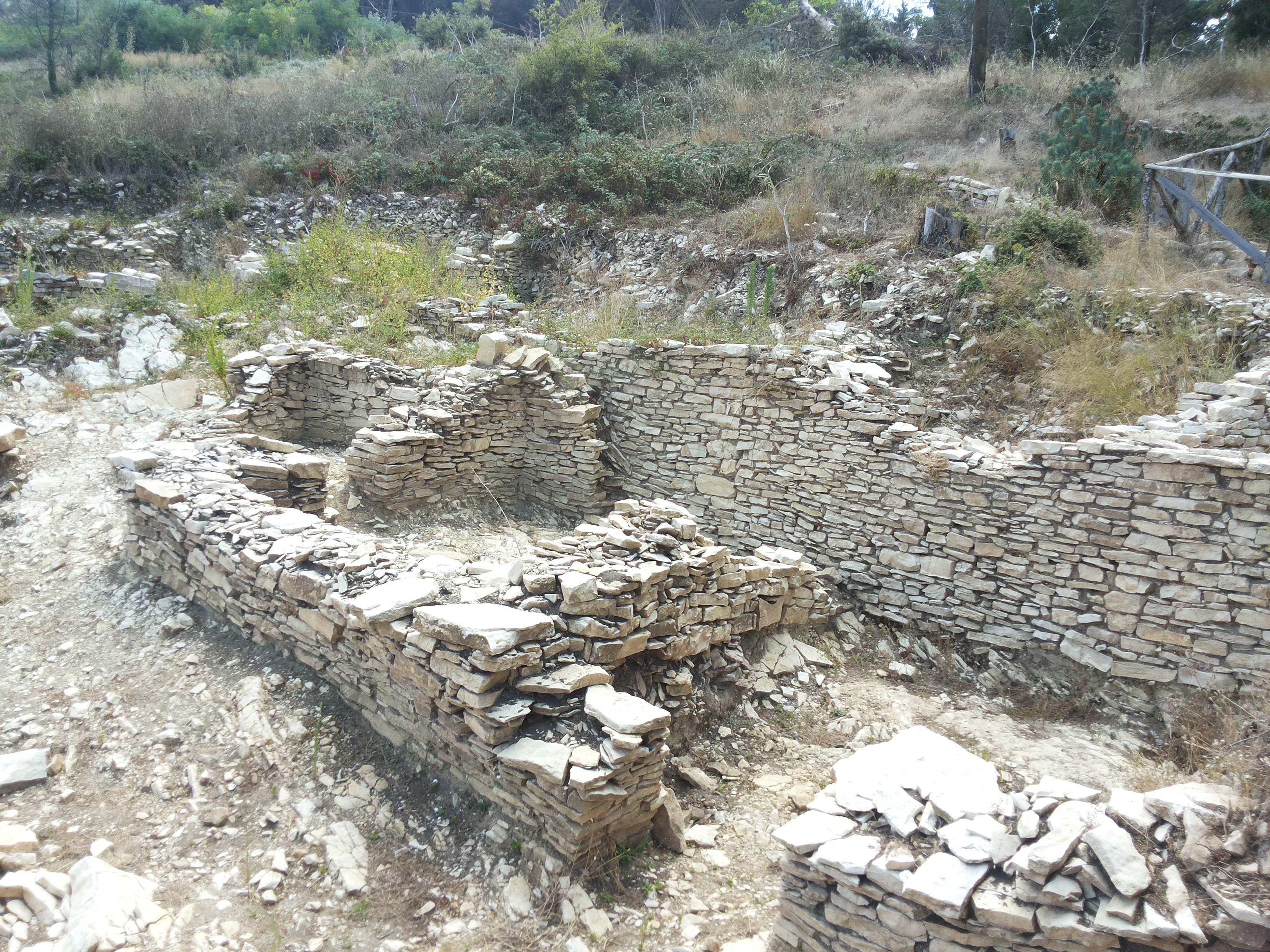 Scavi effettuati dall'Archeoclub nel 2014